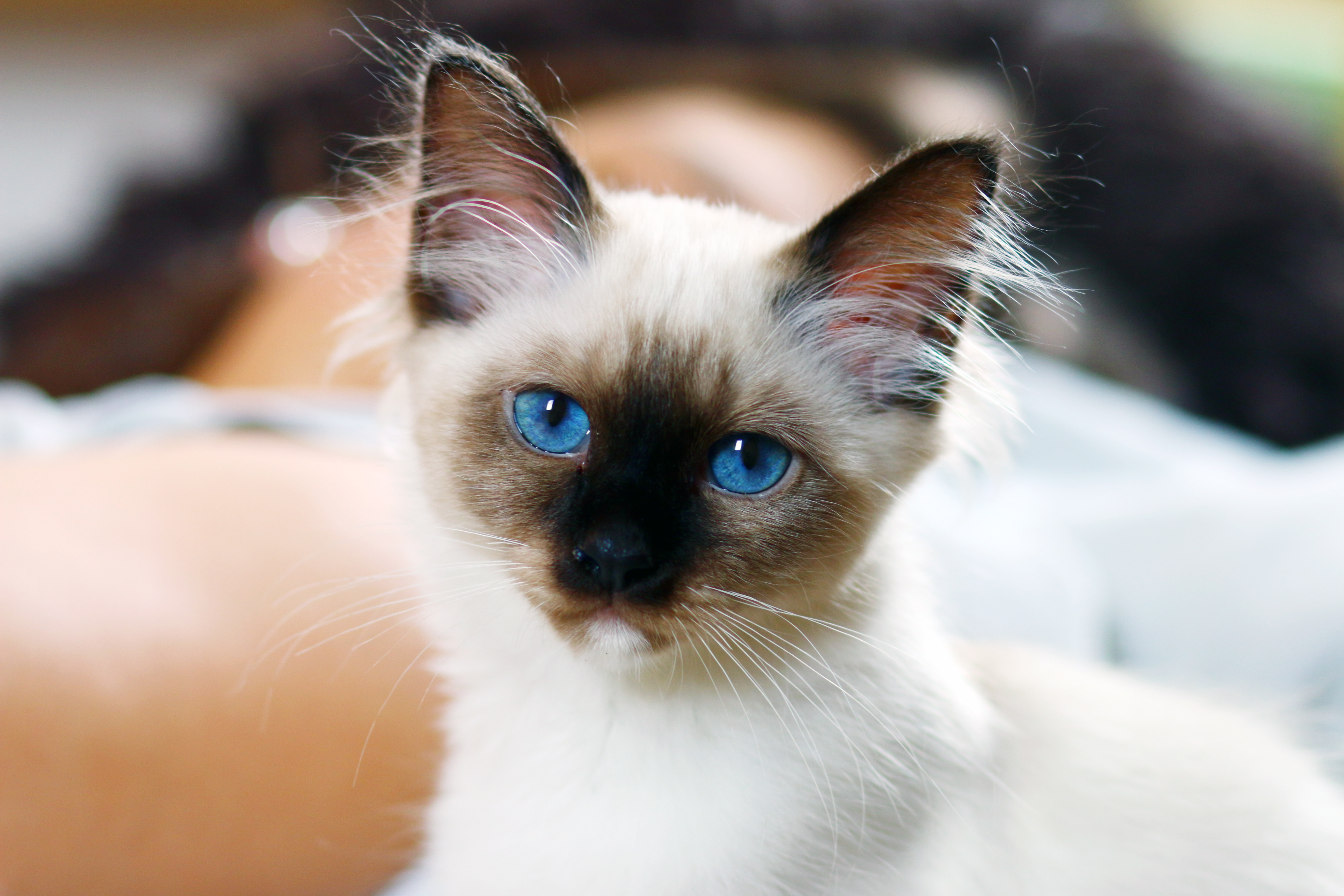 Junger Heilige-Birma Kater "Heiliger Bimbam".